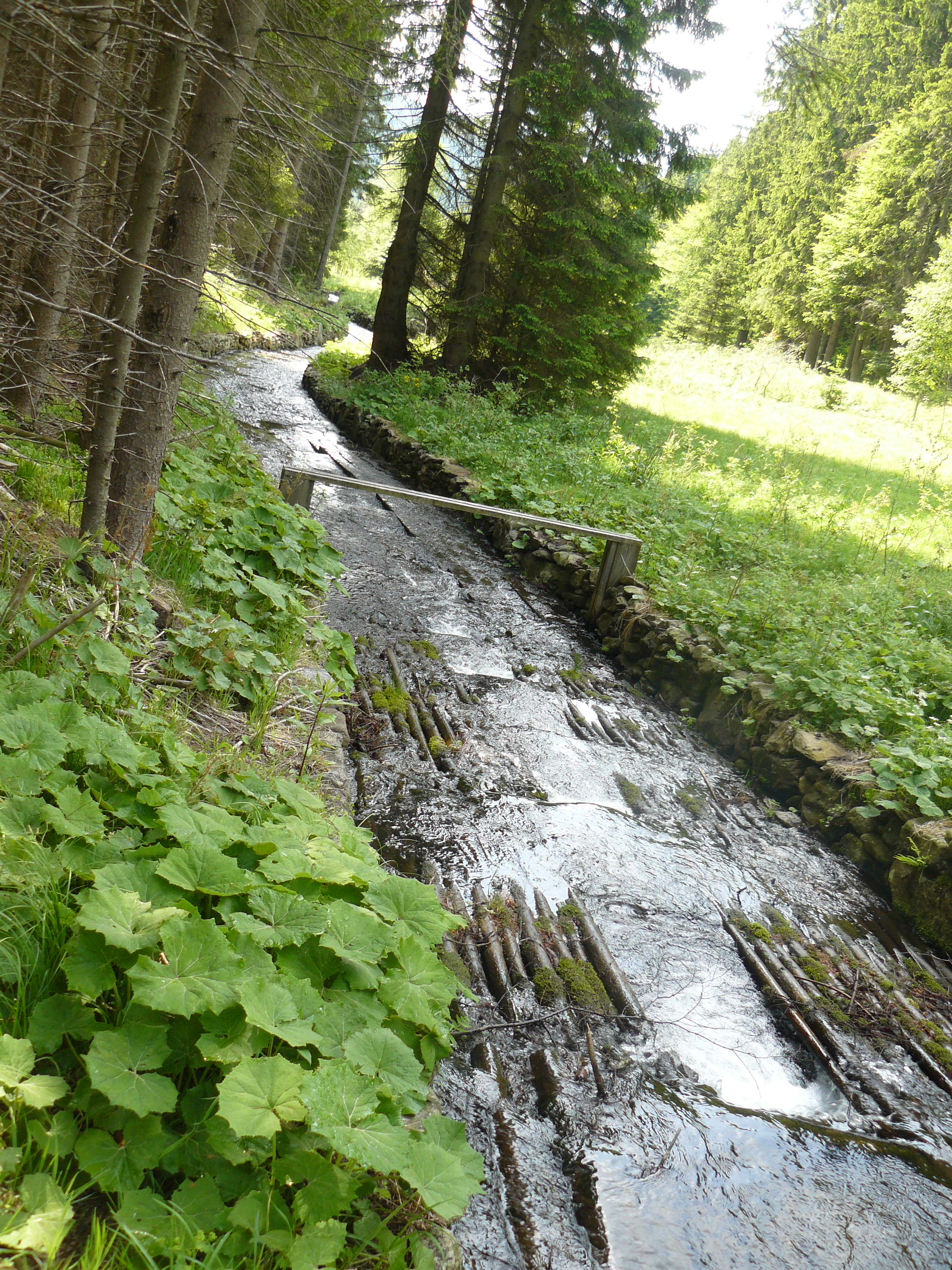 Plavební kanál Kaplického potoka, Horní Vltavice (Boubínský prales) a Lenora